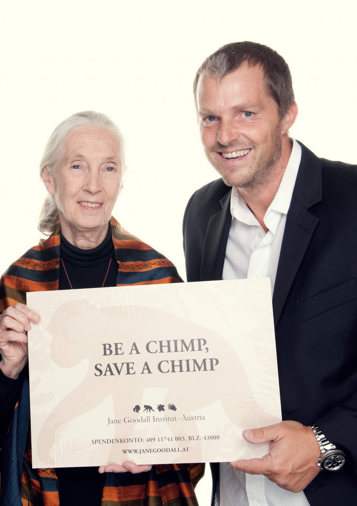 Jane Goodall with Manfred Baumann